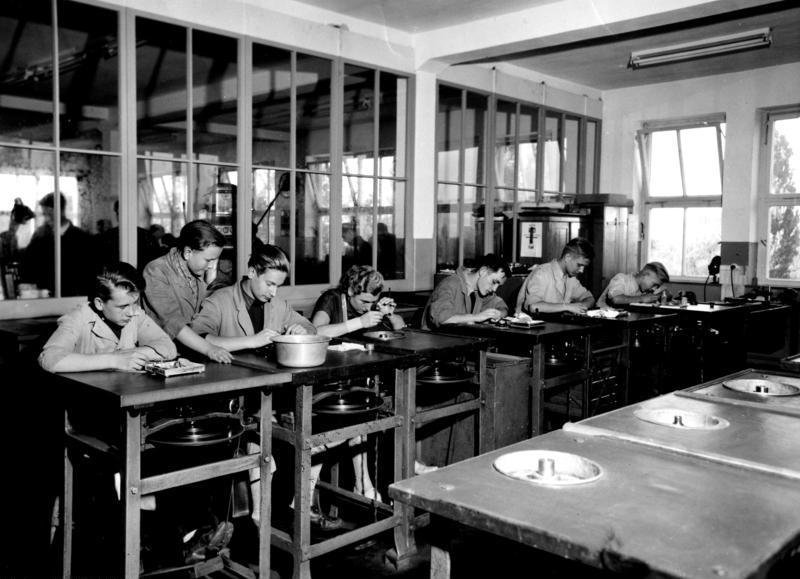 Zeiss-Winkel, Opt. Werke, Göttingen Feinoptiklehrlinge bei Schleif- und Polierarbeiten an Trittbänken